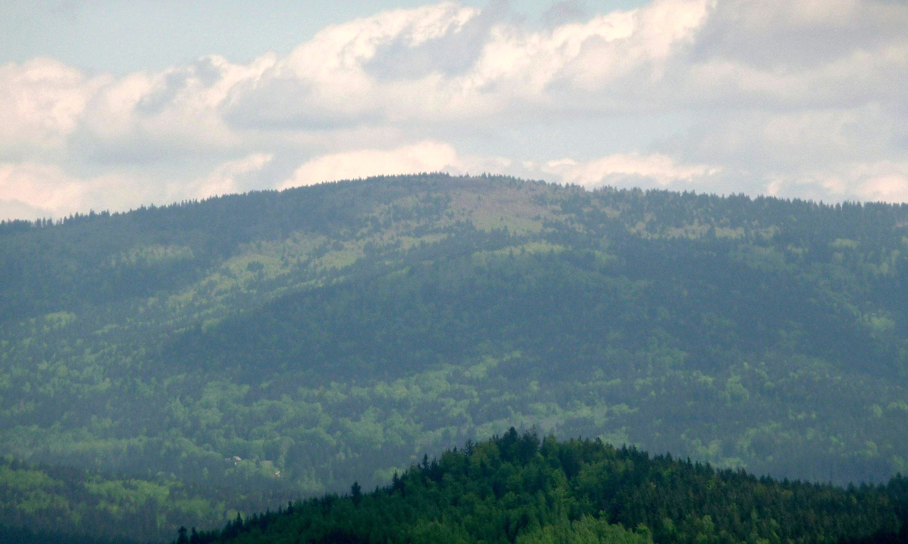 Der Scheuereckberg von Rabenstein aus